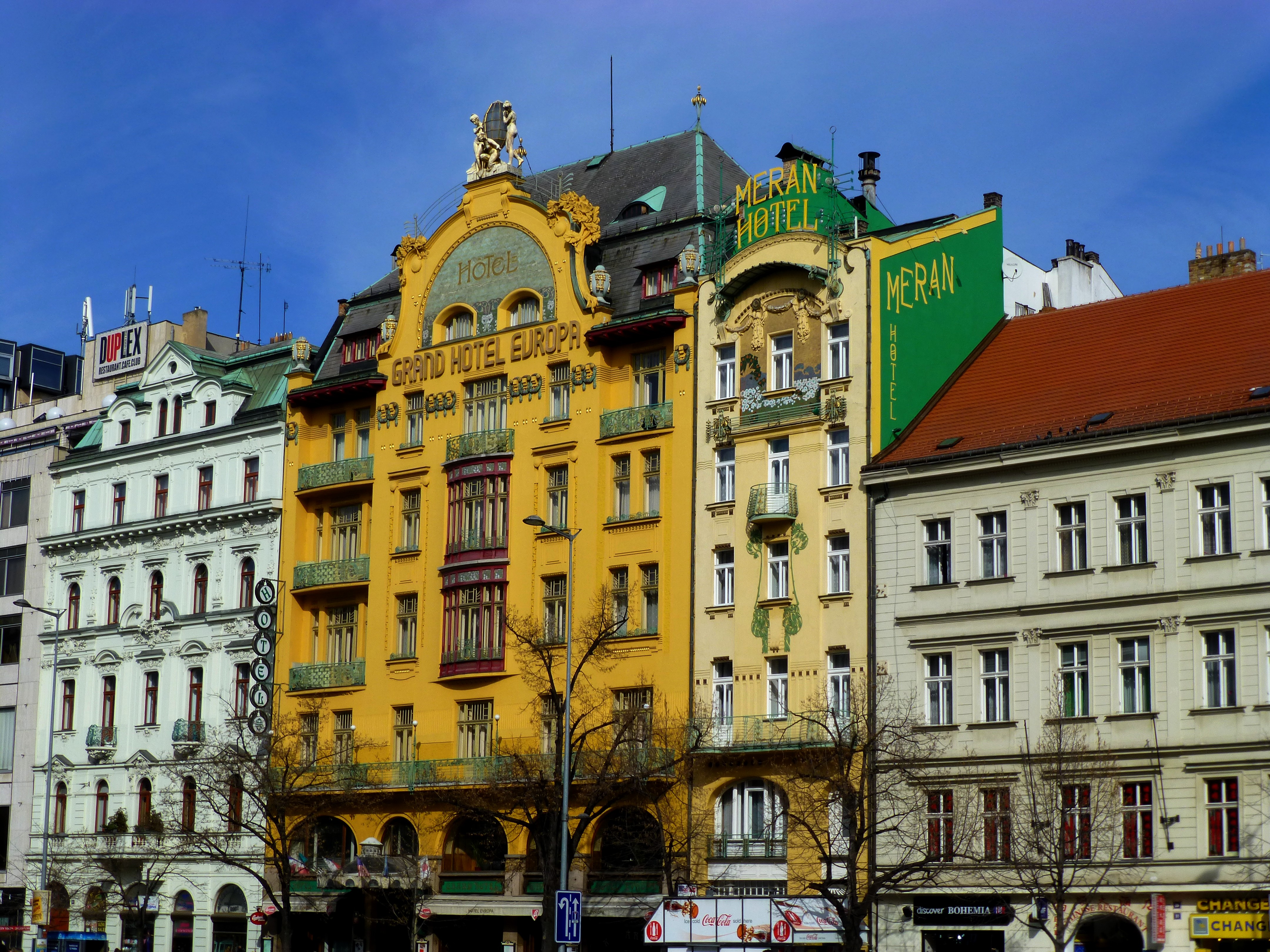 Prag - Grand Hotel Europa und Meran Hotel am Wenzelsplatz - Václavském náměstí